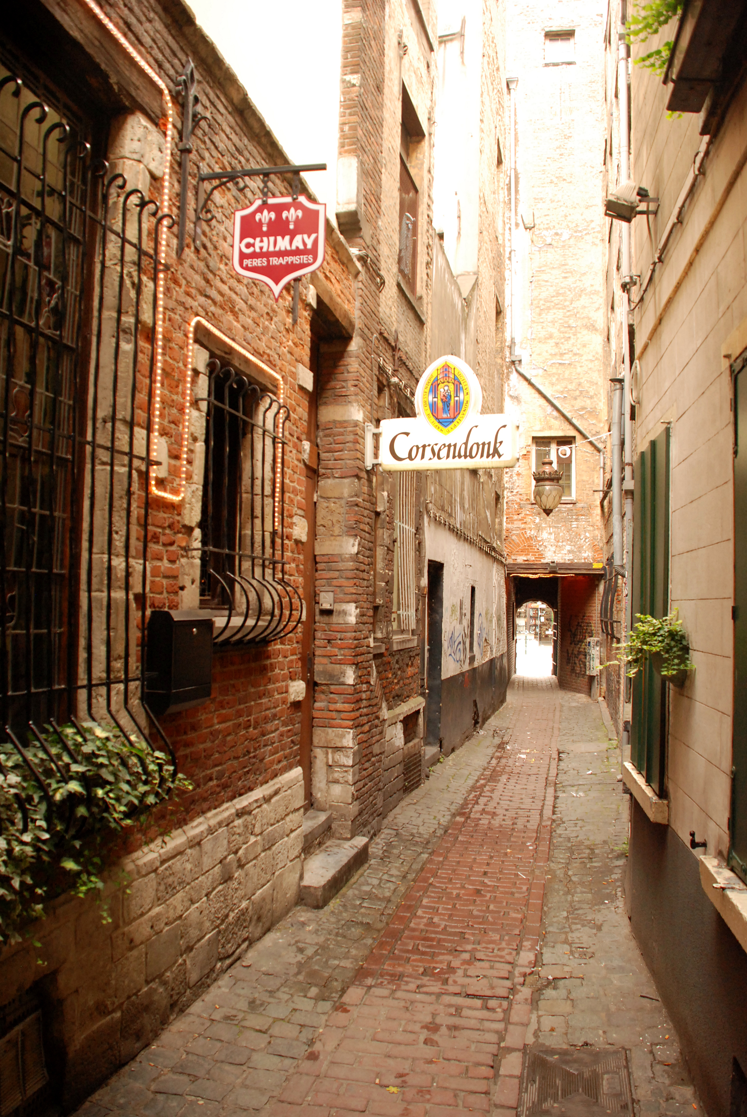 Belgique - Bruxelles - Impasse Saint-Nicolas